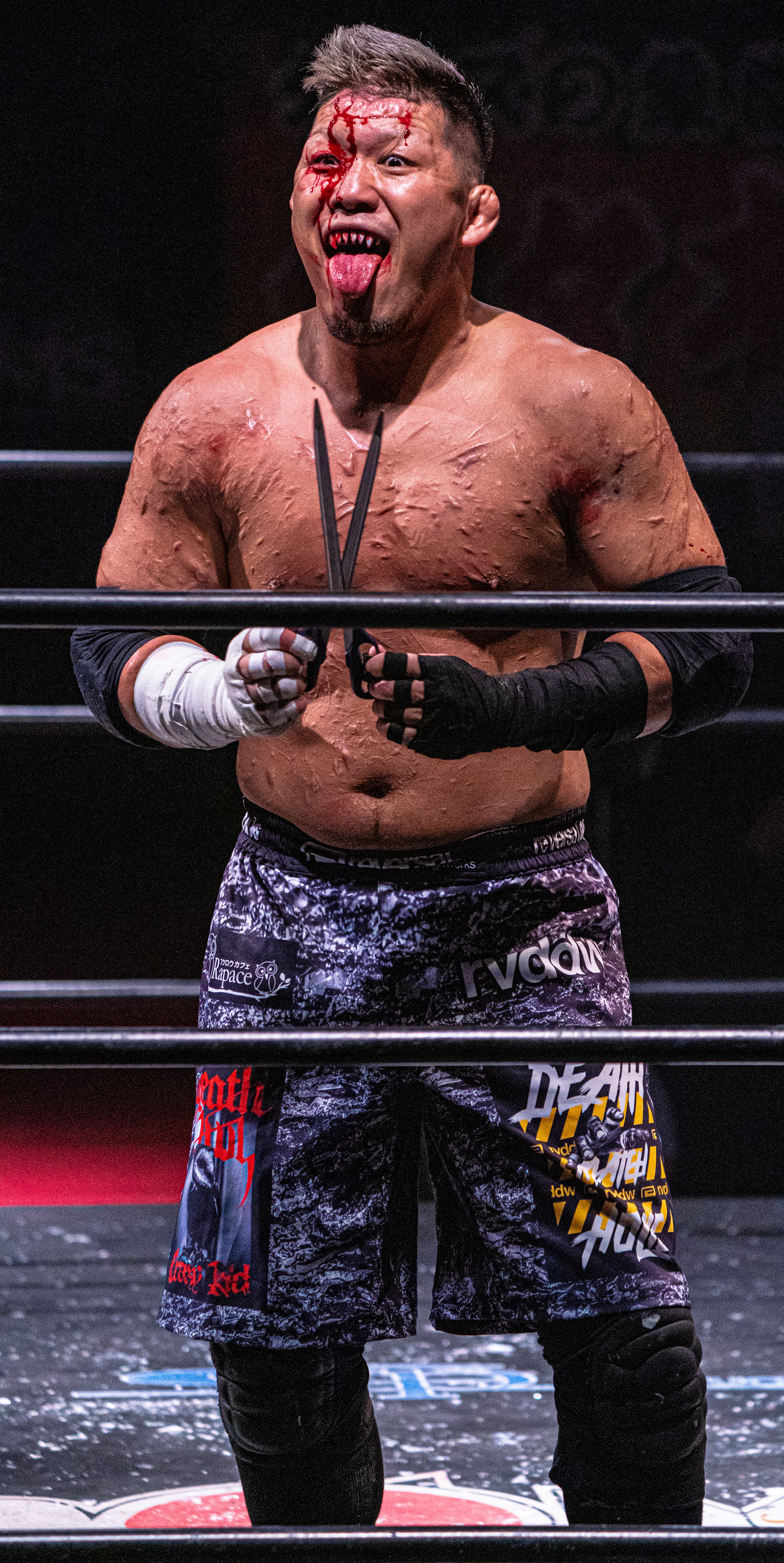 2020.06.10 新木場 1st RING